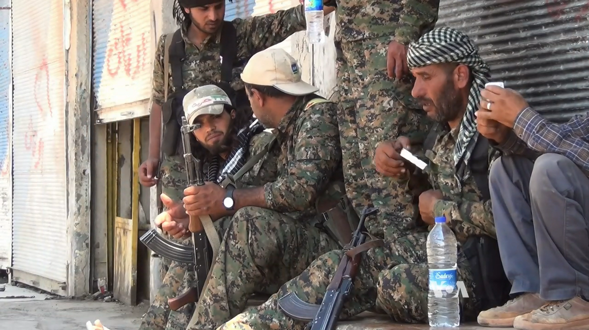 Membres de l'ASL et des YPG à Tall Abyad c. 24 juin 2015.